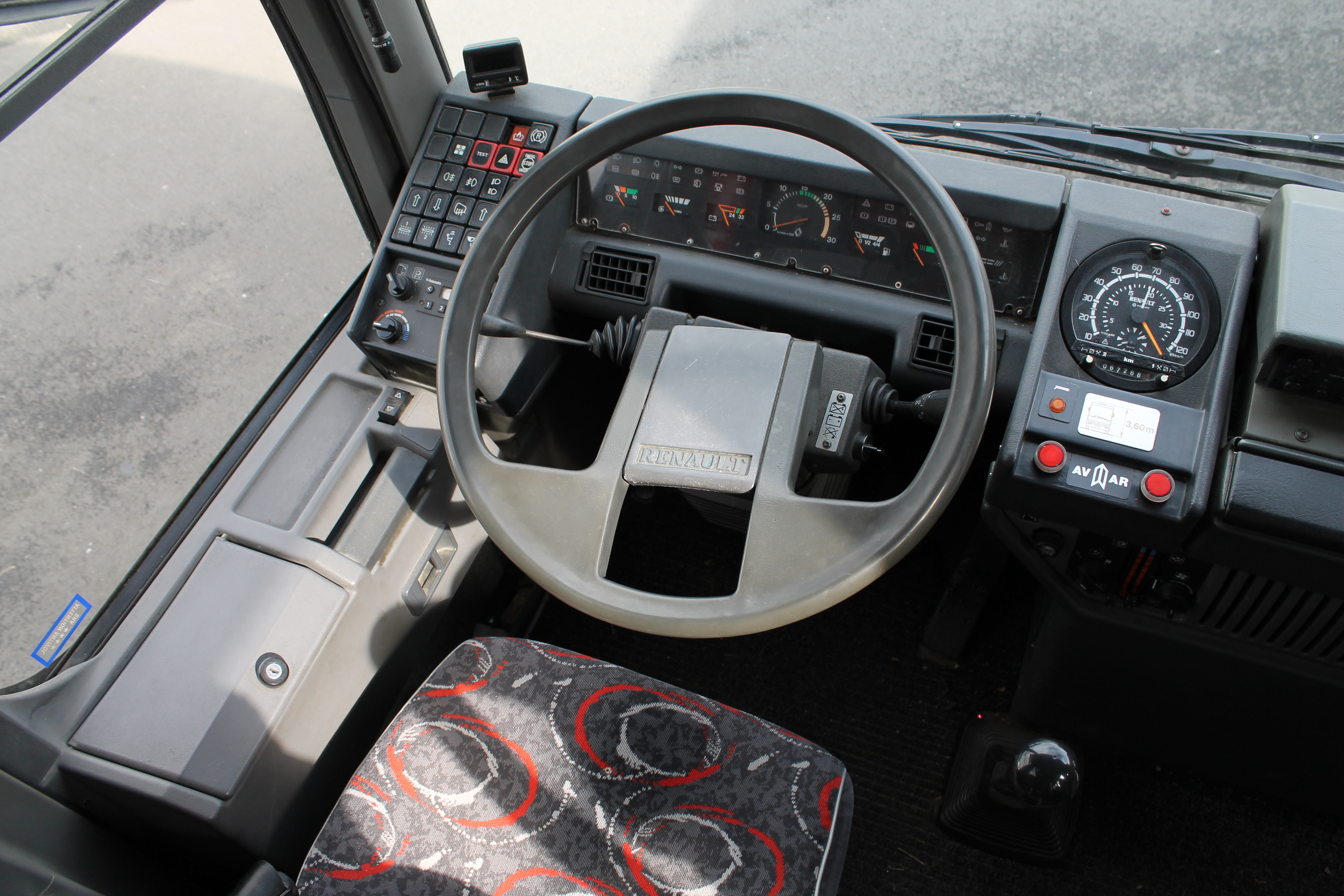 Renault FR1 - poste de conduite